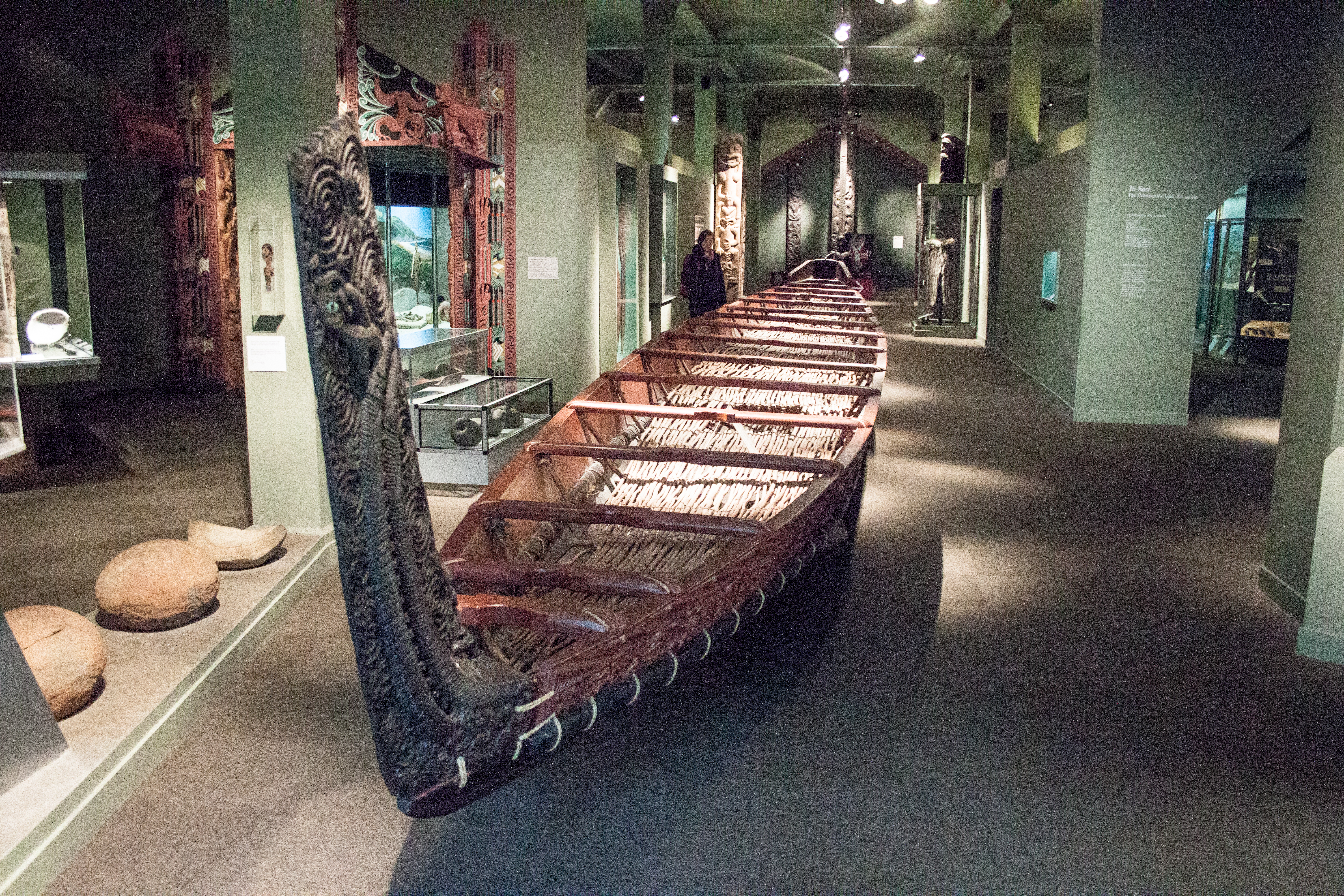 Maori canoe (waka)